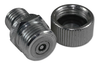 Gasfüllventil